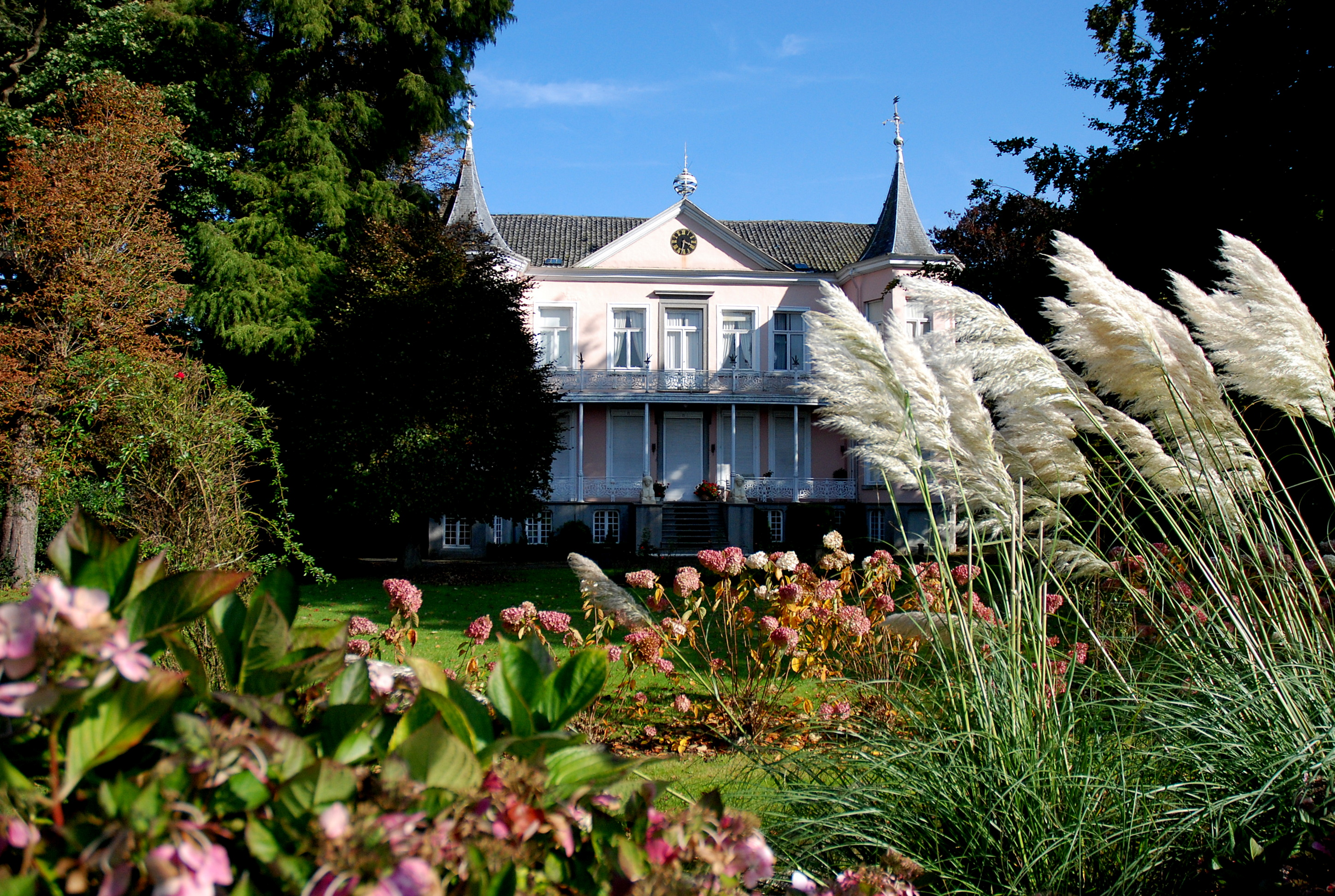 Kasteel te Velde in Lodewijk XVI-stijl in Merendree, België